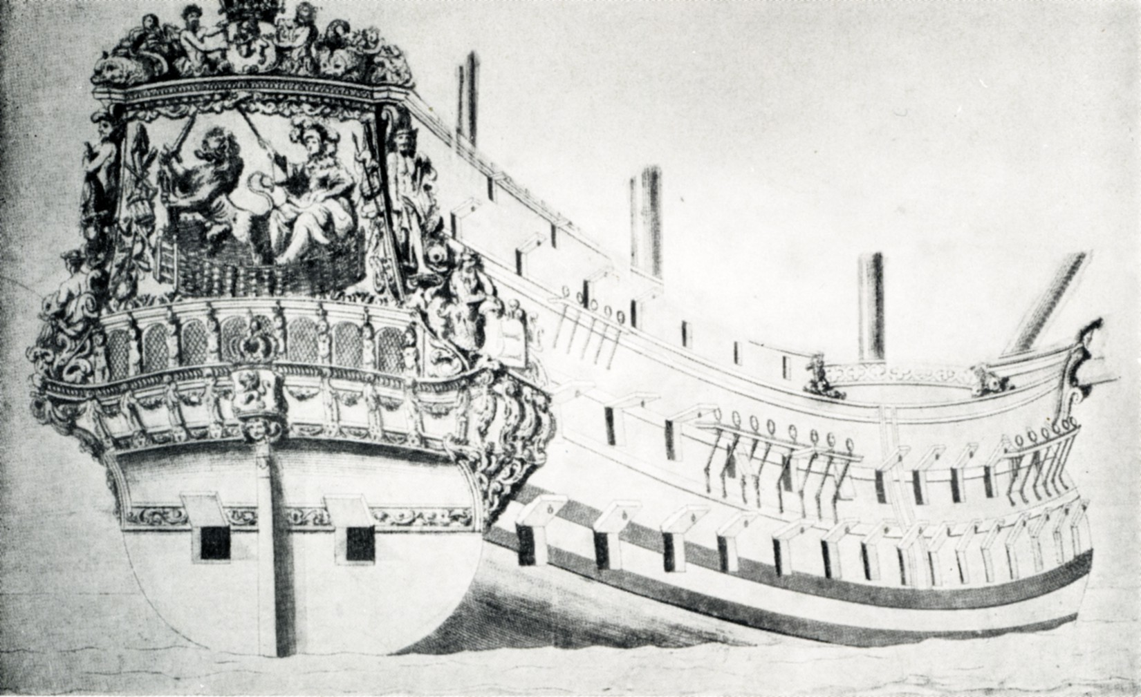 Zweidecker de Holland’sche Magd in den Tuin